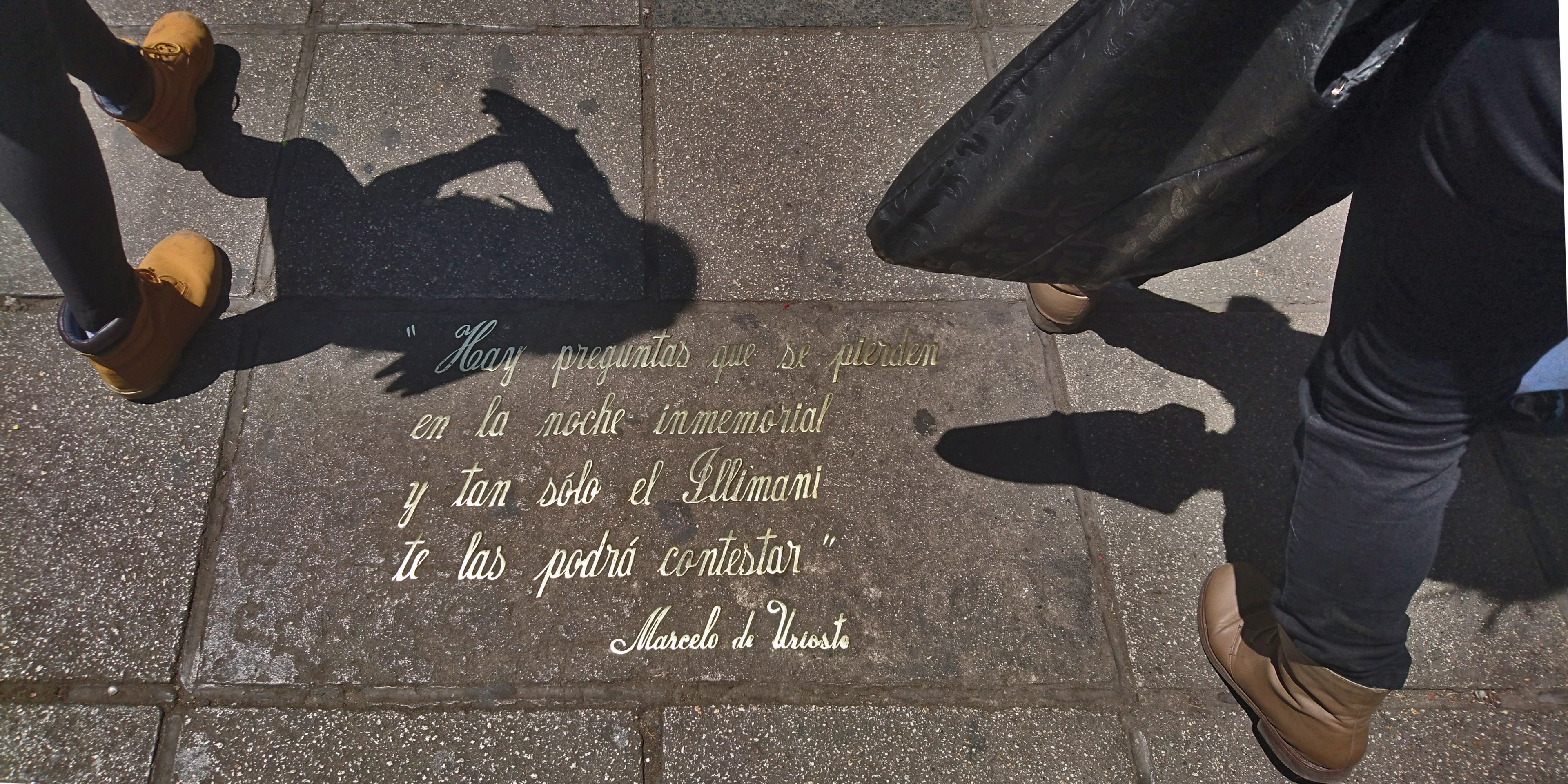 Versos sobre el Illimani en letras de bronce en las baldosas de la Av. Camacho, La Paz Bolivia